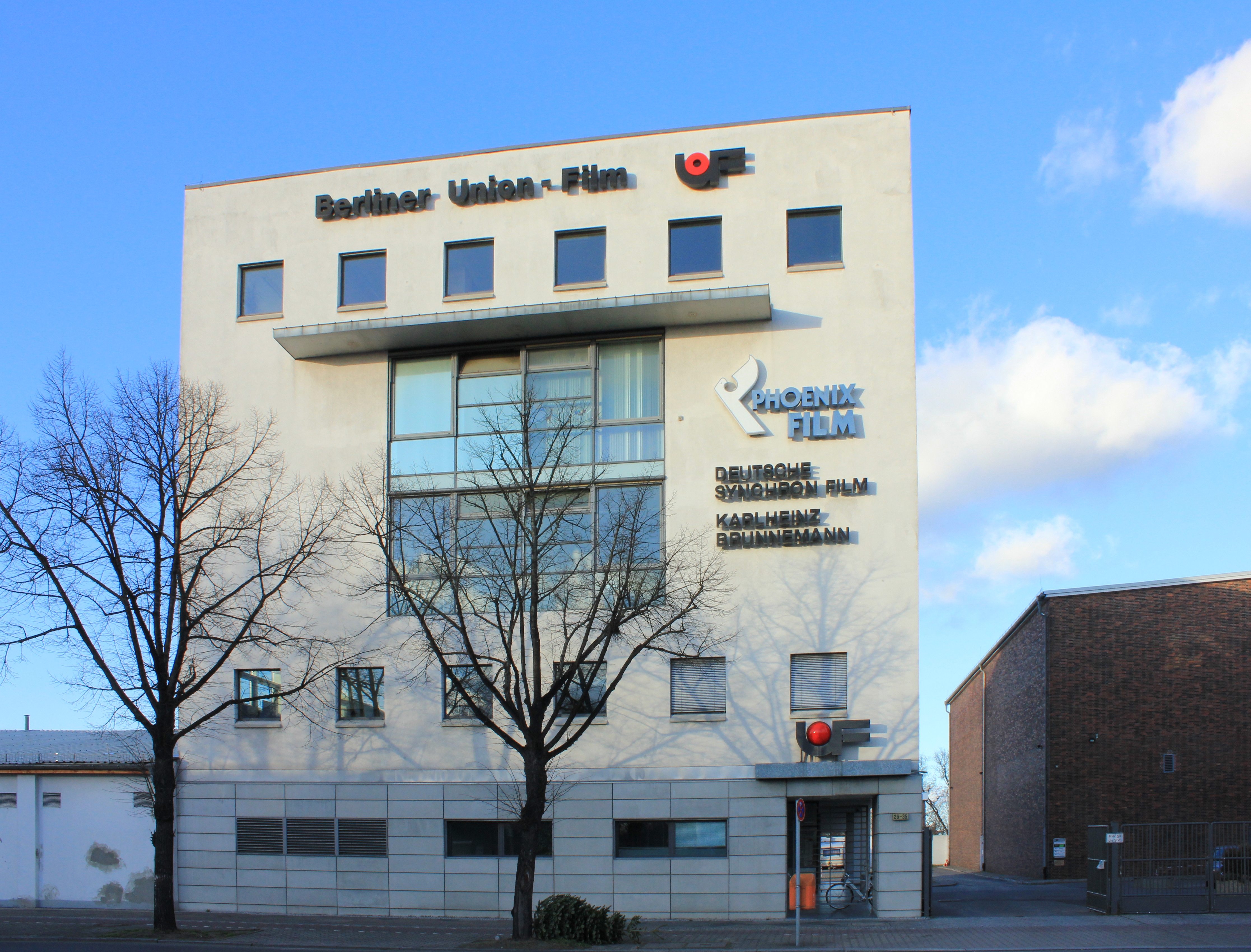 Ufa-Filmstudios, Studio 2 1913 von Bruno Buch, Umbau 1934-35 von Otto Kohtz; Studio 1, 1934-35 von Otto Kohtz